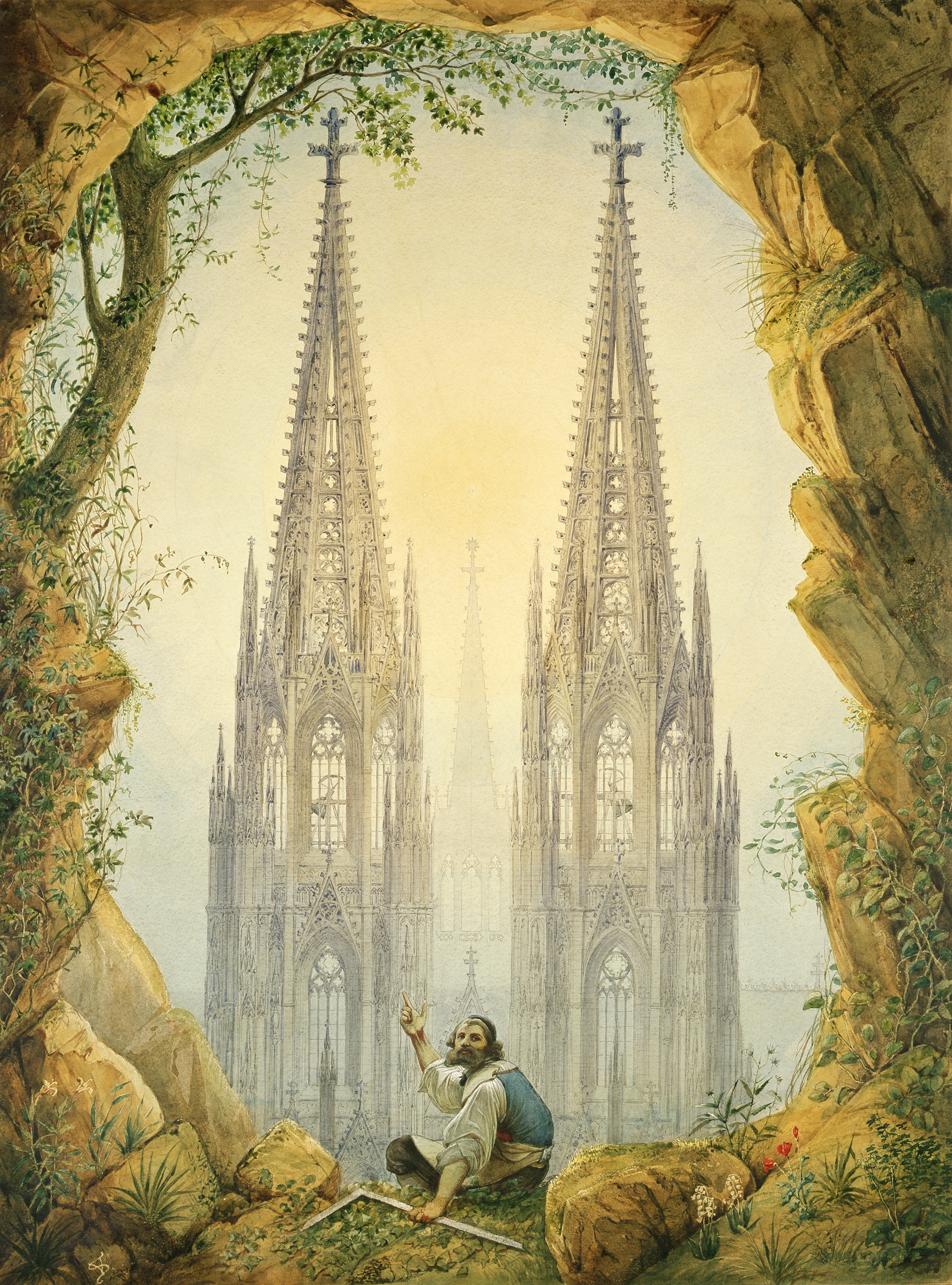 Vinzenz Statz: "Und fertig wird er doch!", Vision der vollendeten Domtürme, Aquarell auf Papier, 1861